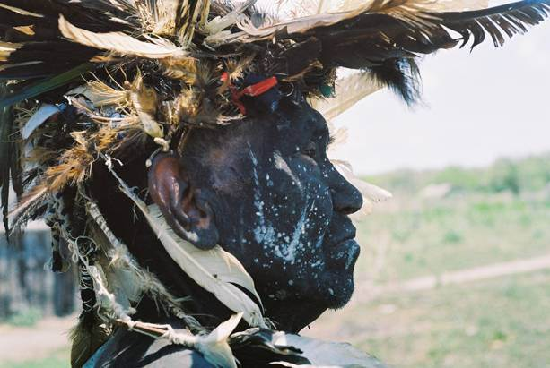 Foto tomada por Guillermo Sequera. "Arte del Cuerpo" 2006. Licencia Creative Commons.